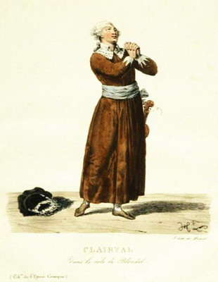 Clairval (JB Guignard) dans le rôle de Blondel (Richard Coeur de lion de Grétry)